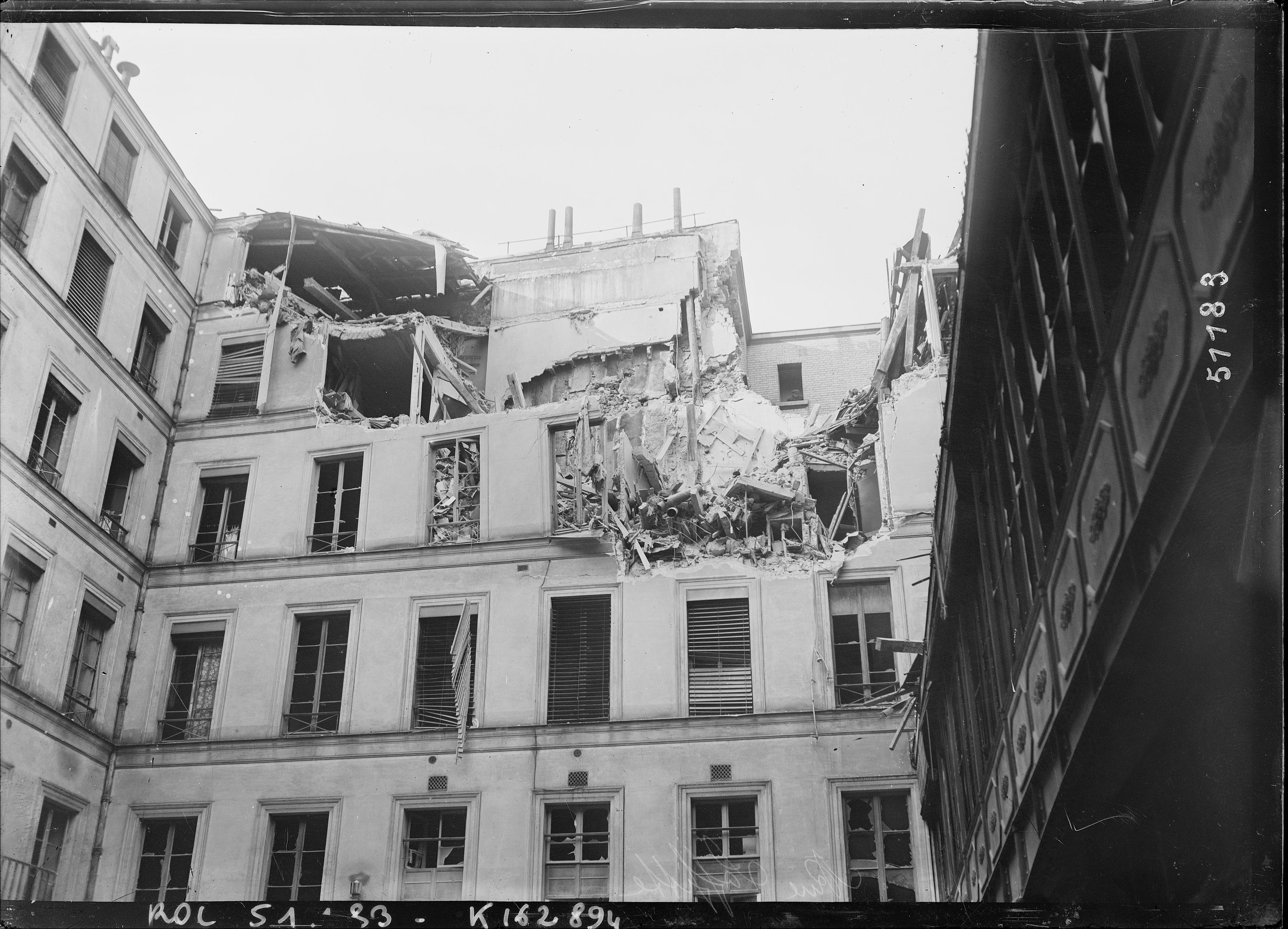 Dégâts dus aux bombardements par avions du 8 mars1918